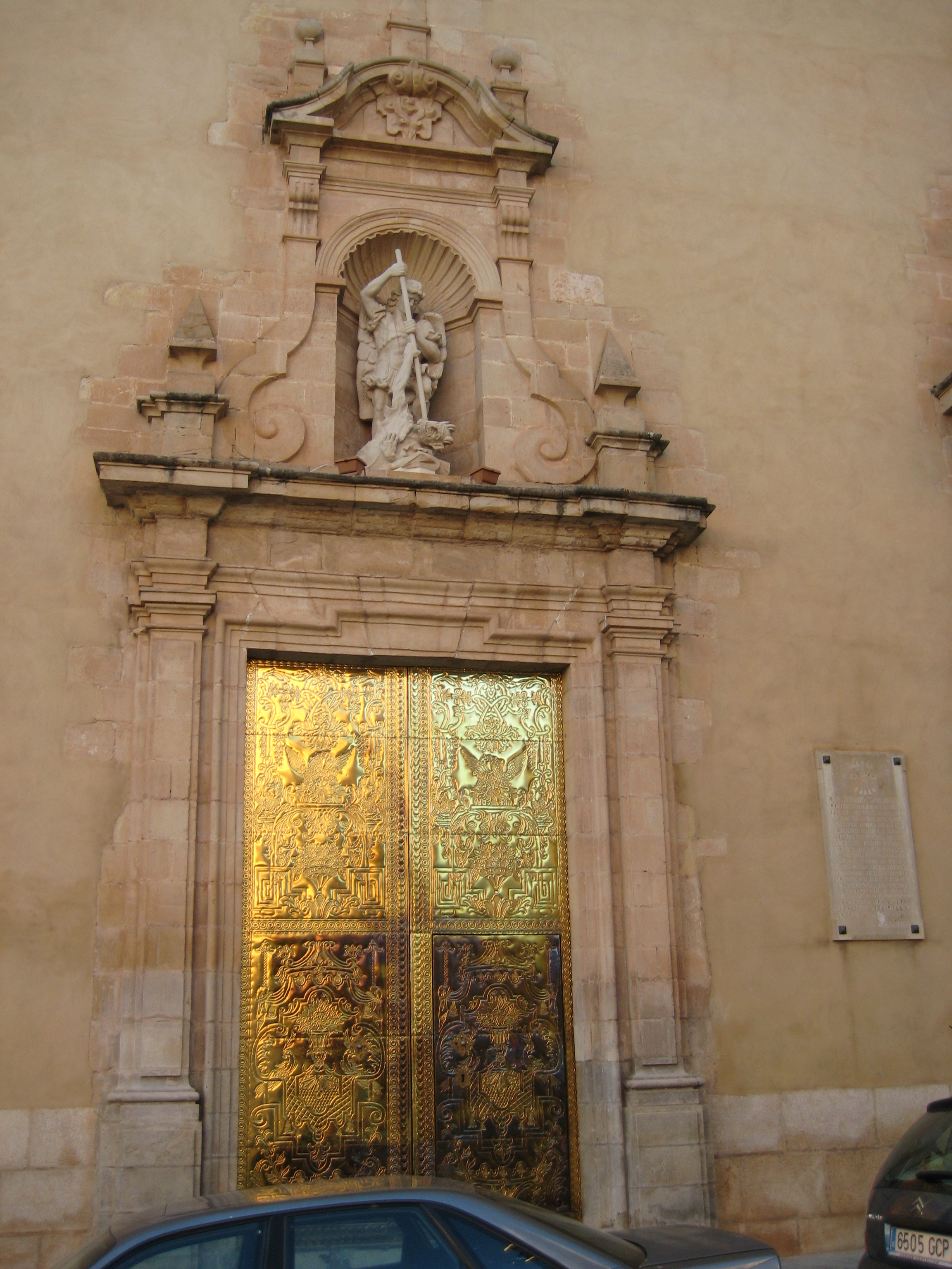 Portada lateral de Sant Miquel Arcàngel de l'església de l'Assumpció de Llucena (L'Alcalatén)